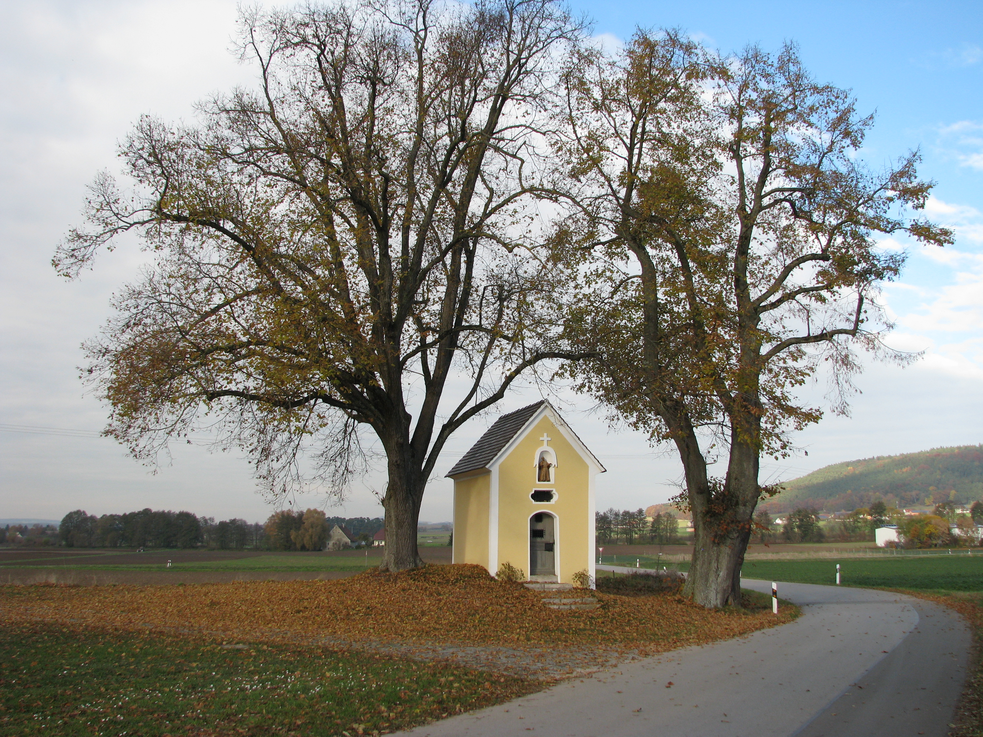 Jettenhofen, Ortsteil von Freystadt im Landkreis Neumarkt in der Oberpfalz, Kapelle Maria Dolorosa